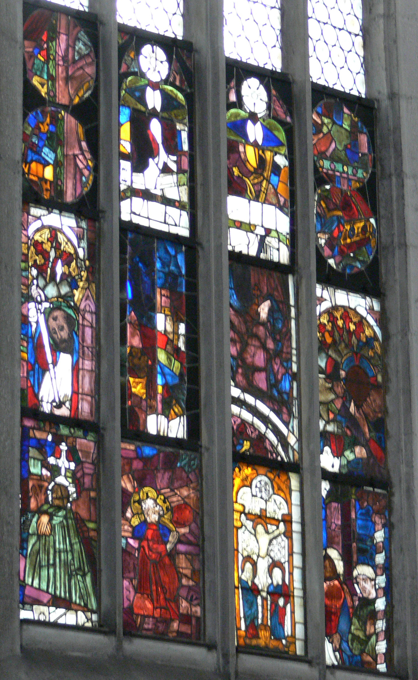 Stadtpfarrkirche St. Maria Magdalena, Münnerstadt „Depotfenster“ mit diversen mittelalterlichen Glasmalereien